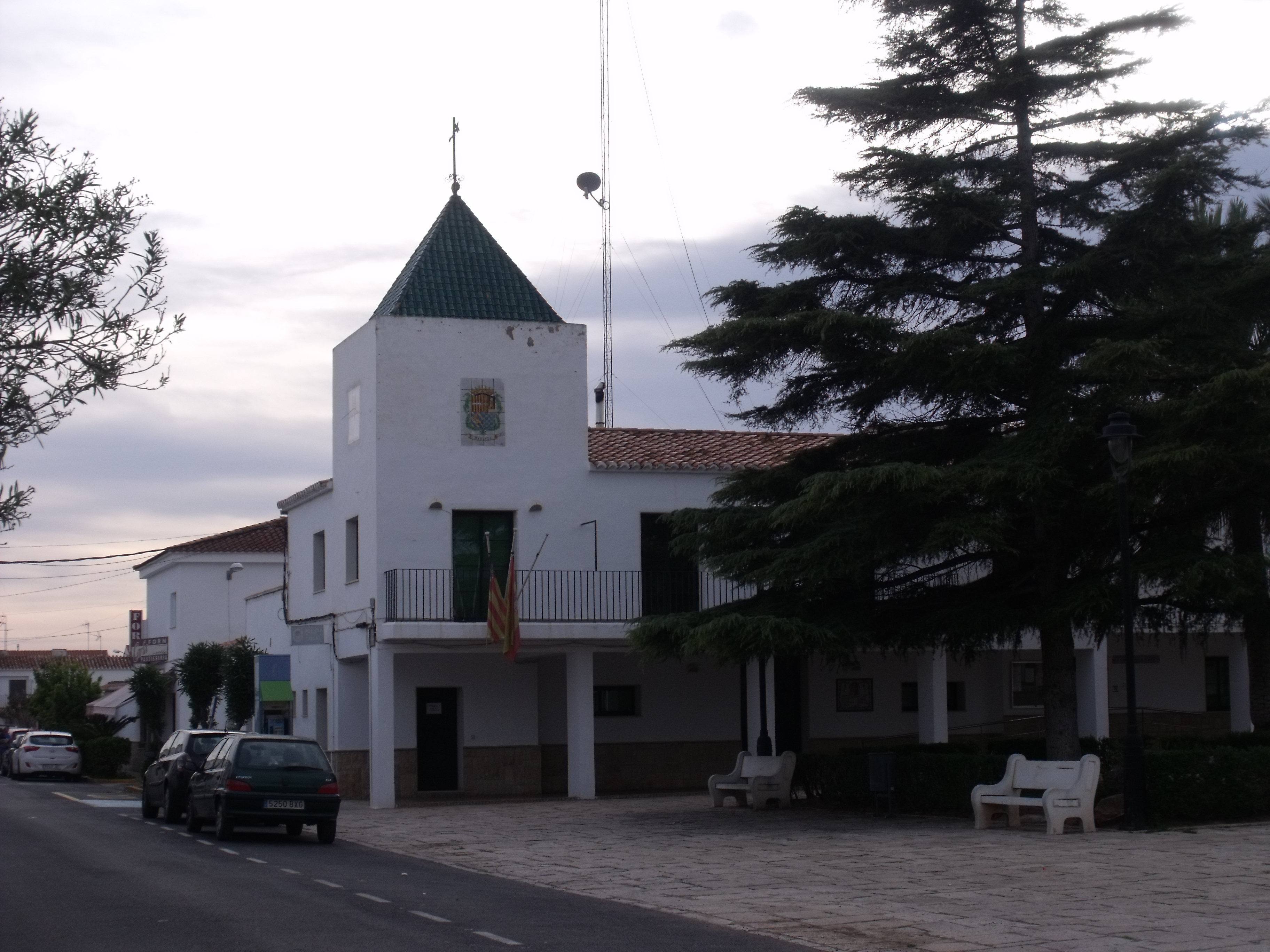 Ayuntamiento